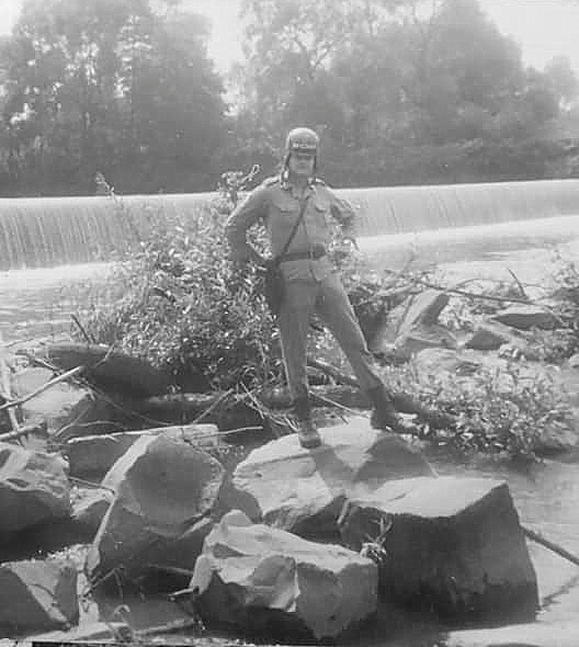 Żołnierz WOP z PM-63 RAK przy granicznej rzece Olzie - Strażnica Wojsk Ochrony Pogranicza Pogwizdów